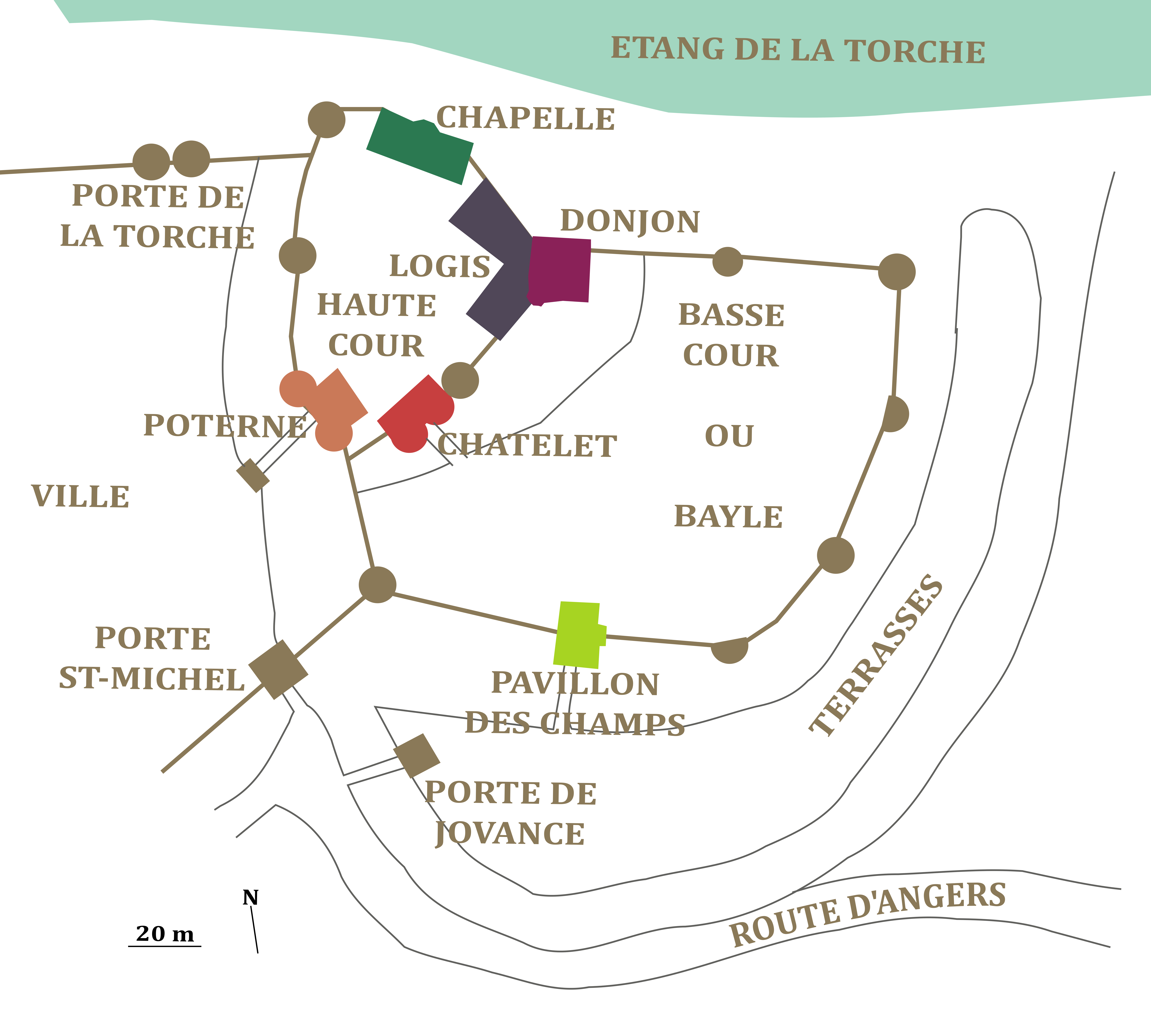 Plan du château de Châteaubriant restituant son état au XVème siècle.